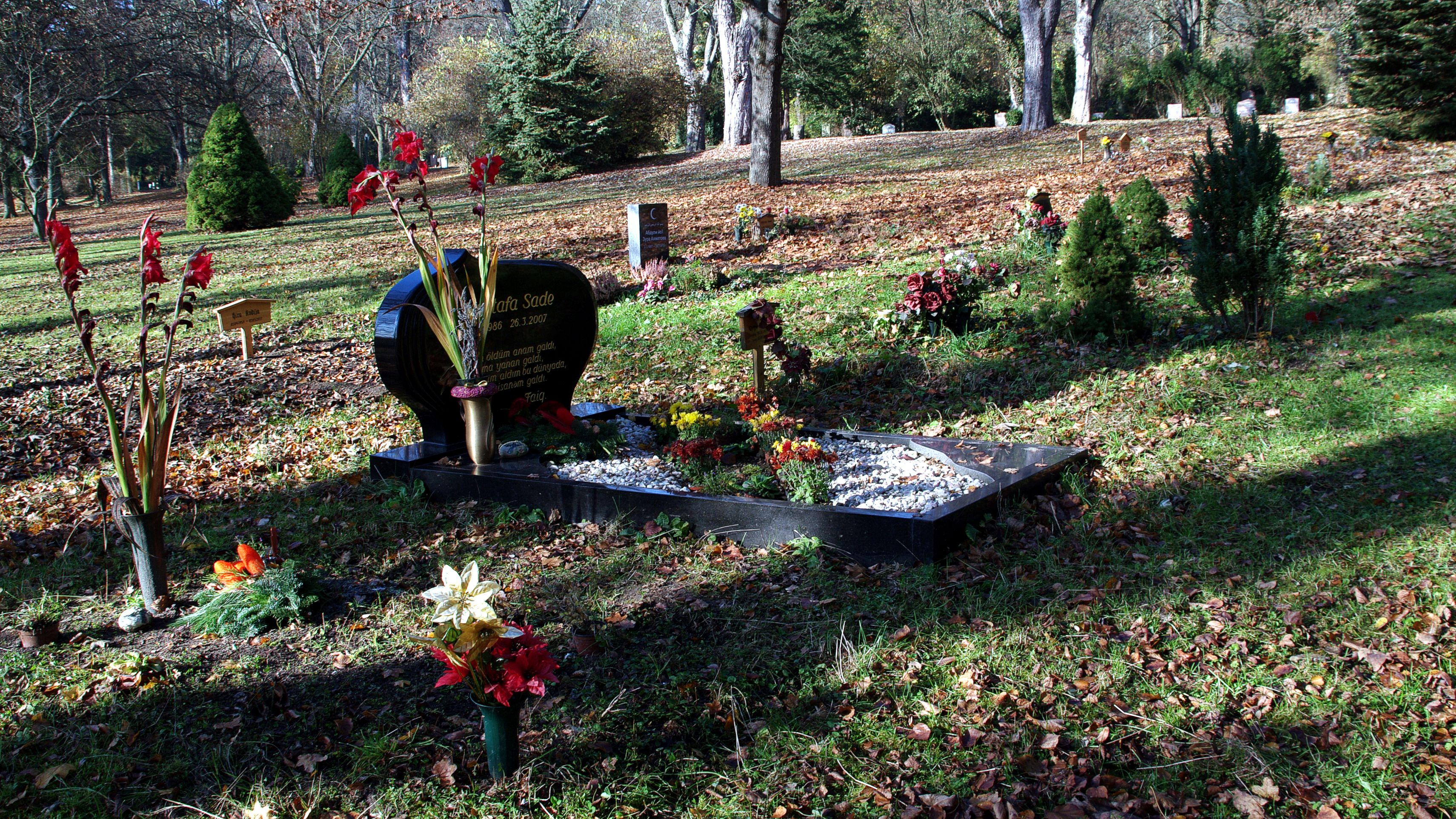 Ein muslimisches Grabfeld auf dem Erfurter Hauptfriedhofs.